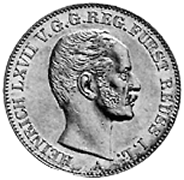 Hendrik LXVII